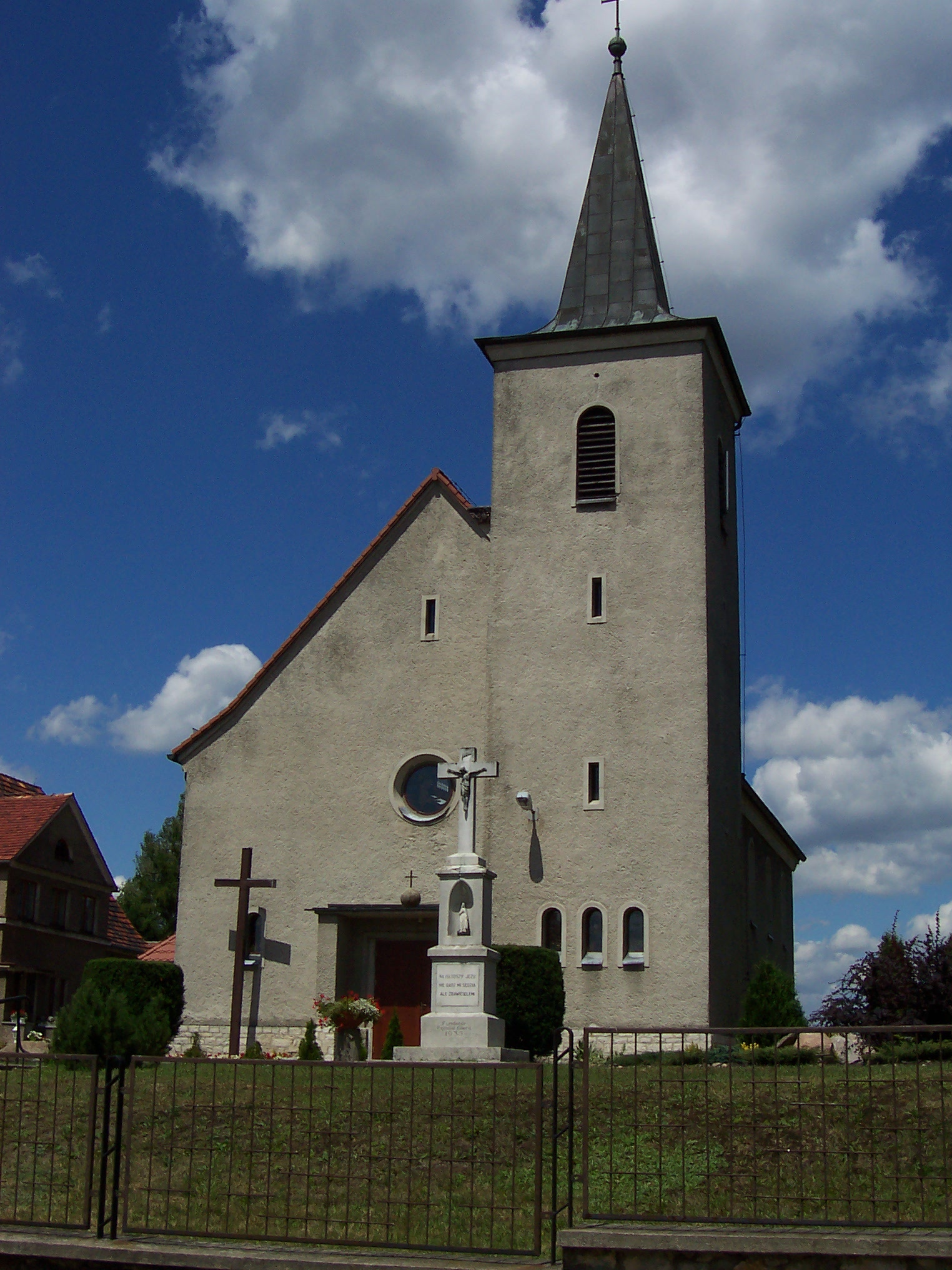 Kościół w Wojsce